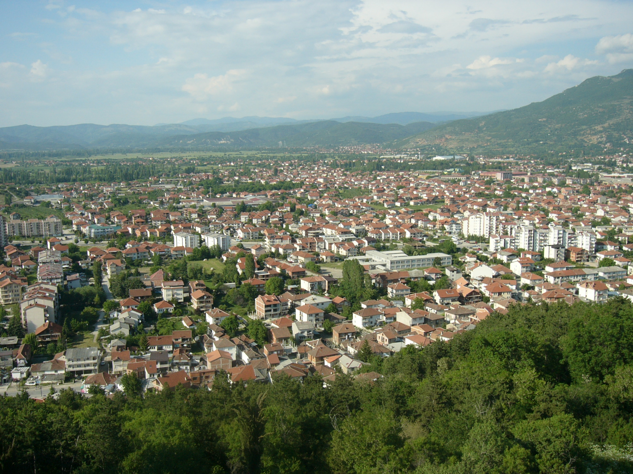 Ohrid, Macedonia